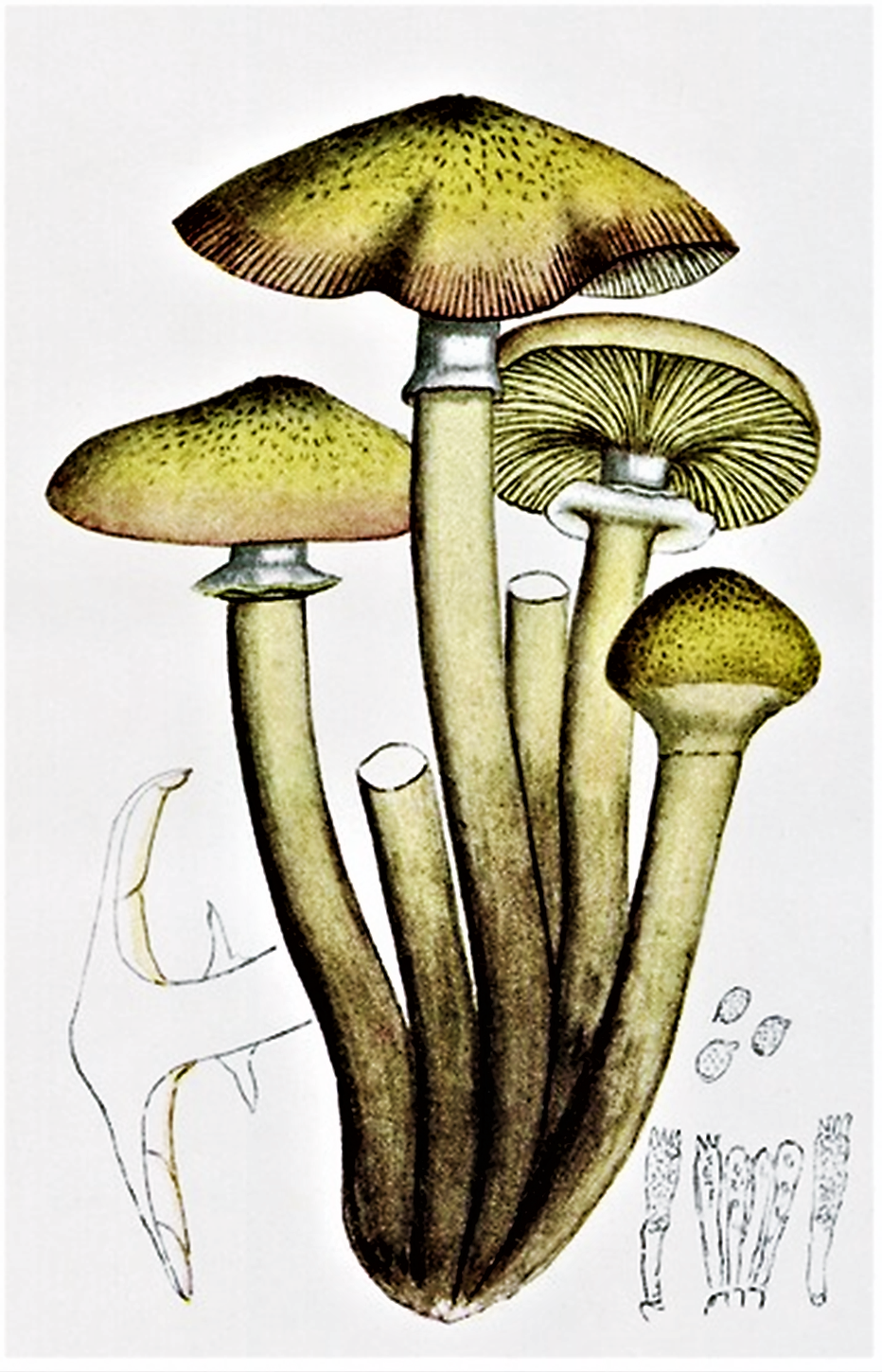 Giacomo Bresadola: Armillaria mellea (Vahl, 1790) P.Kumm. (1871)